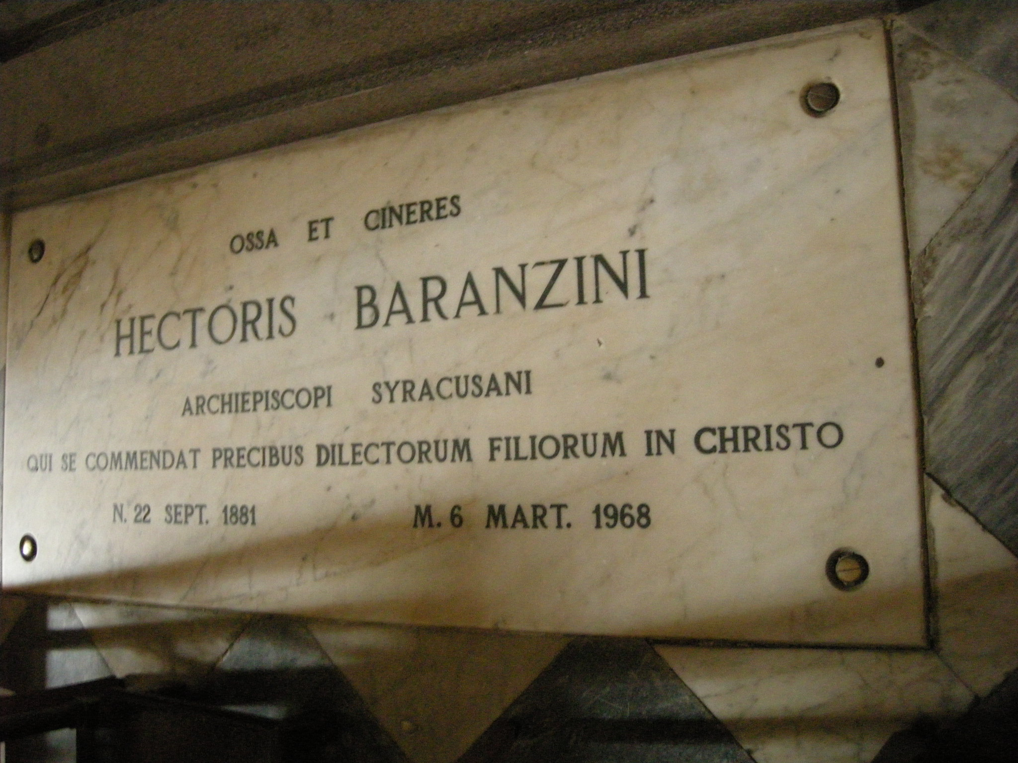 Sepolcro dell'arcivescovo di Siracusa Ettore Baranzini (1881-1968), nella Cappella del Crocifisso del Duomo di Siracusa.